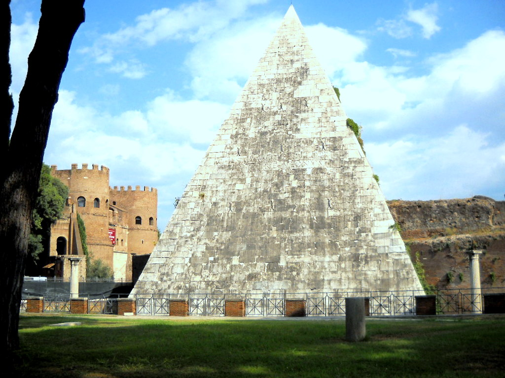 Piramide Cestia e Porta San Paolo viste dal cimitero acattolico. Roma, rione Testaccio